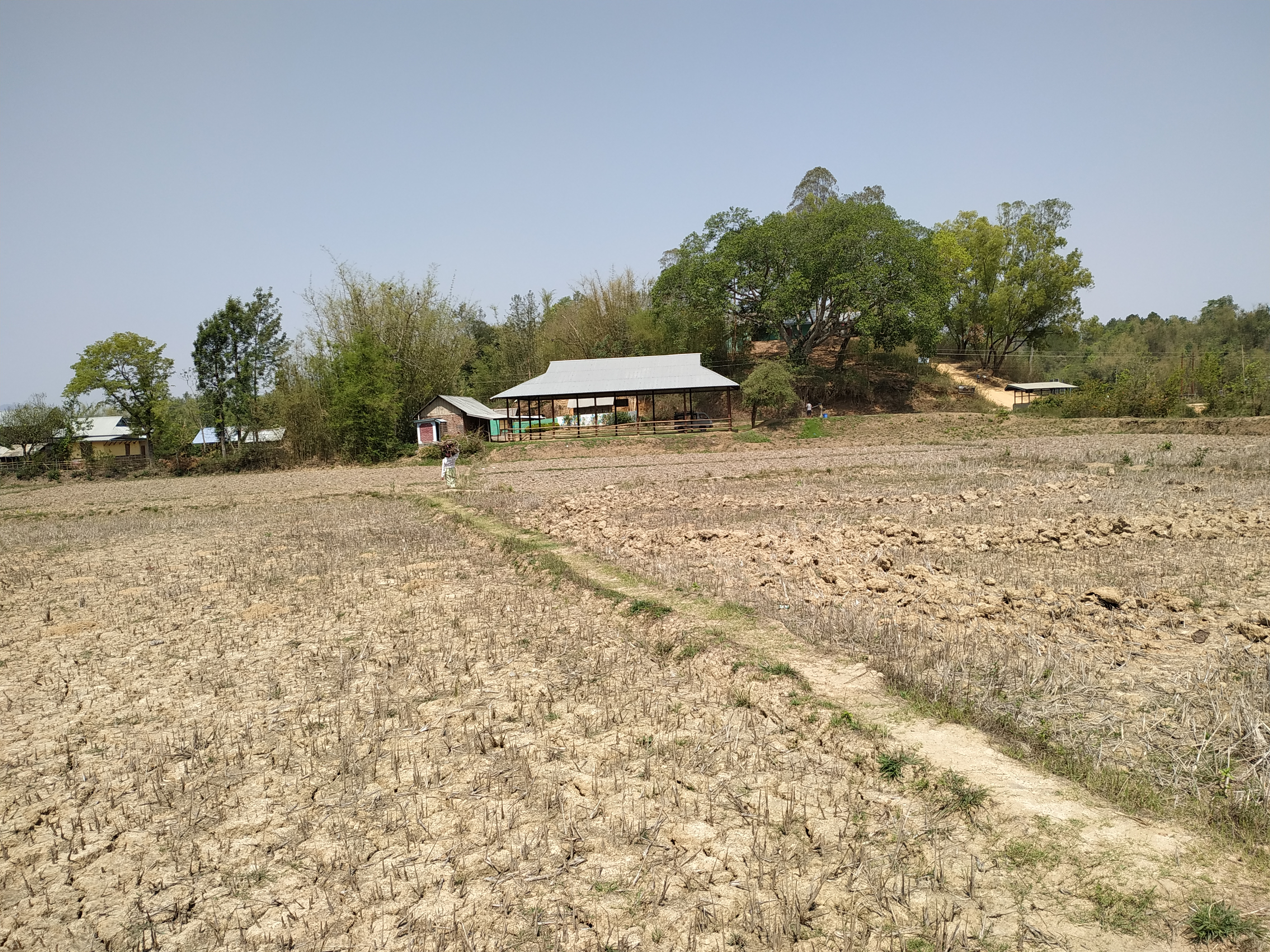 ꯃꯤꯇꯩ ꯂꯣꯟ: ꯅꯣꯡꯄꯣꯛ ꯊꯪꯕꯥ ꯃꯥꯏꯀꯩꯗꯒꯤ ꯌꯦꯡꯉꯛꯄ ꯆꯥꯖꯤꯡ ꯈꯨꯅꯧ ꯐꯖꯔꯕ ꯁꯛꯇꯝ ꯫